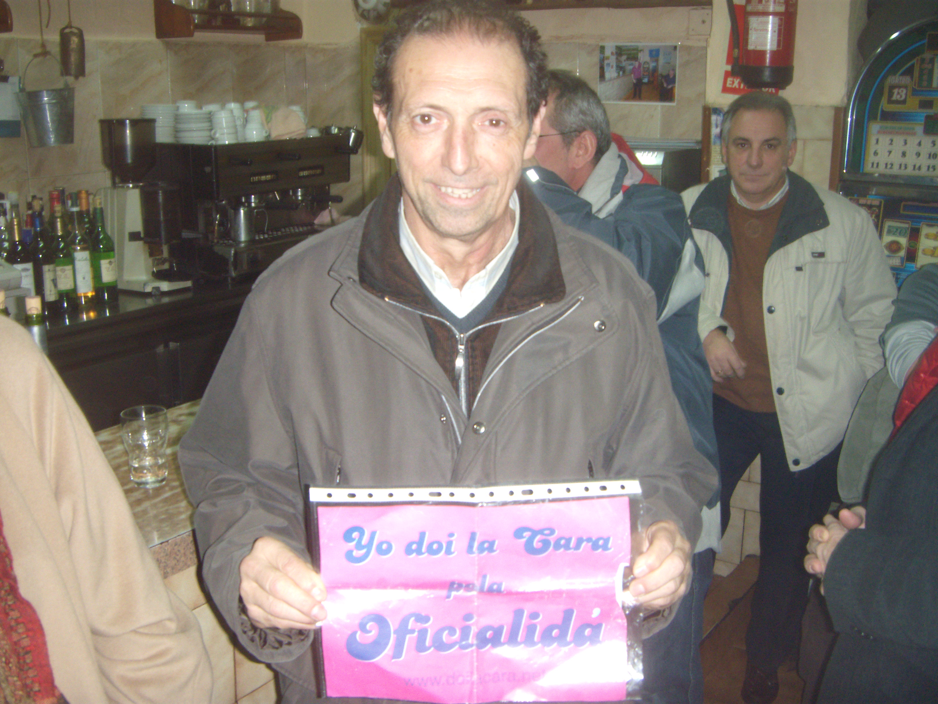 Enrique Castro "Quini" apoyando la campaña "Yo doi la cara pola oficialidá", a favor de la oficialidad del asturiano